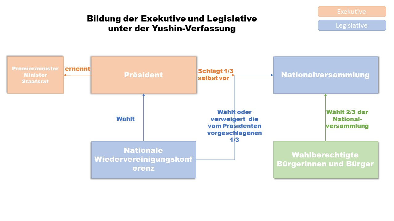 Kurzer Überblick über die Bildung der Legislative und Exekutive unter der Yushin-Verfassung